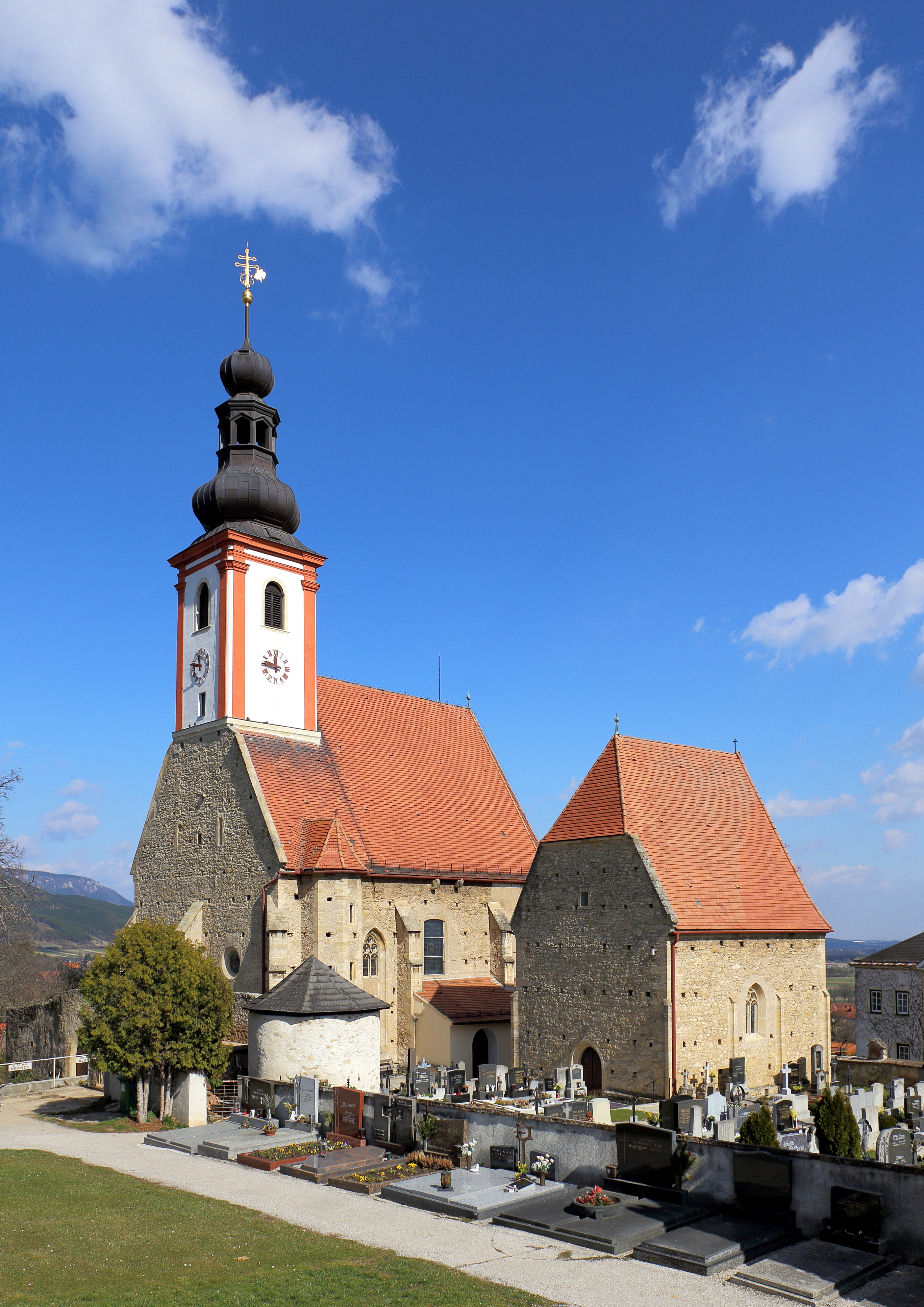 Südwestansicht der Pfarrkirche hl. Anna und der Herz-Jesu-Kapelle (Sebastianskapelle) in der niederösterreichischen Gemeinde Würflach. Die Pfarrkirche ist eine spätgotische Wehrkirche, die zum Teil barockisiert wurde. Im Zuge der Türkenbelagerung wurde sie schwer beschädigt und ab 1685 wieder aufgebaut; unter anderem erhielt sie 1731/33 einen barocken Turmaufsatz an Stelle des zerstörten. Die Herz-Jesu-Kapelle wurde Ende des 15. Jahrhunderts errichtet und war ursprünglich den Pestpatronen hl. Sebastian und hl. Rochus geweiht. Im 17./18. Jahrhundert wurde die Kapelle dem Verfall preisgegeben, jedoch 1878 bis 1892 wiederinstandgesetzt und als Herz-Jesu-Kapelle neu geweiht.